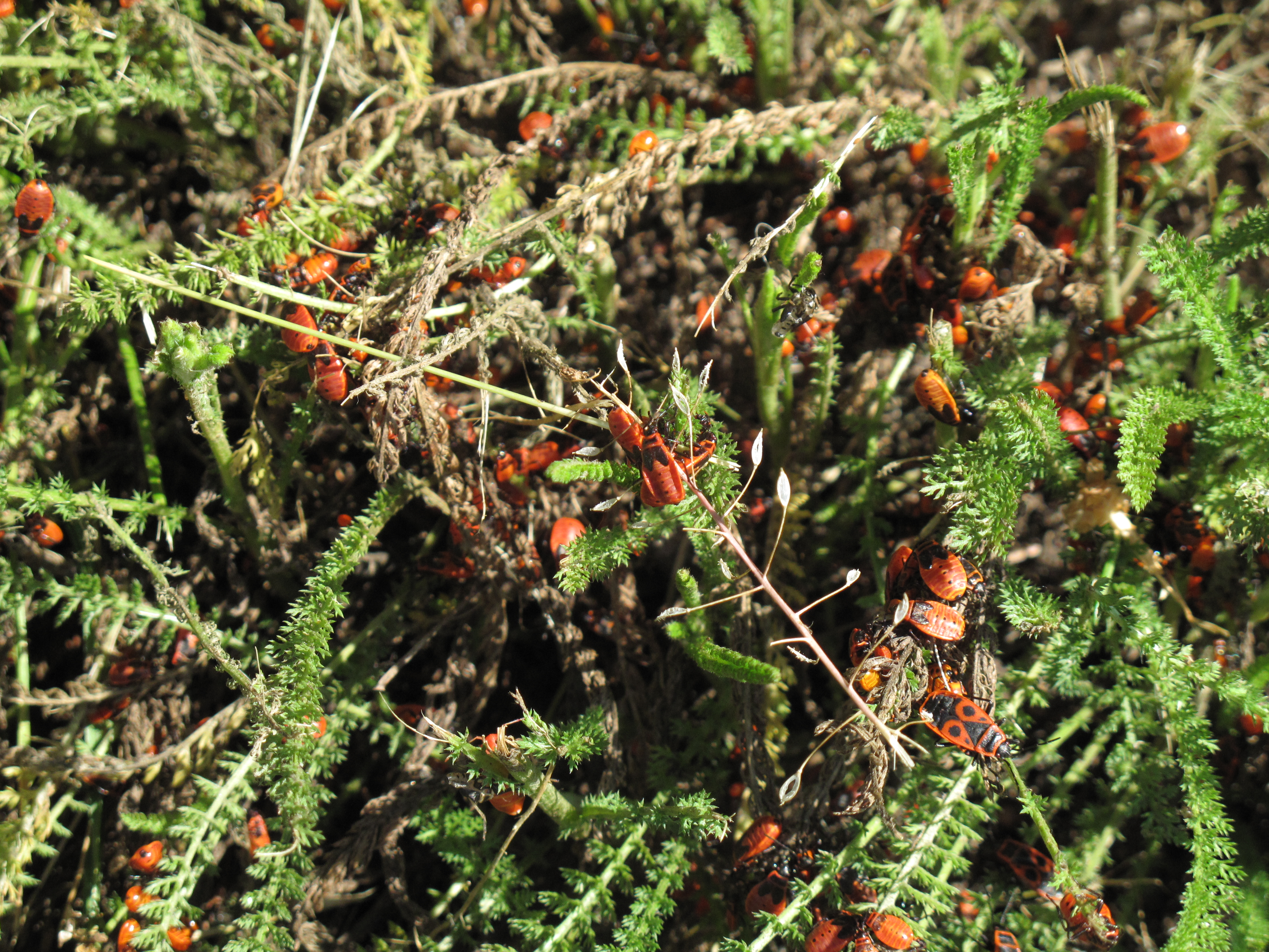 Скупчення особин червоноклопа червоного